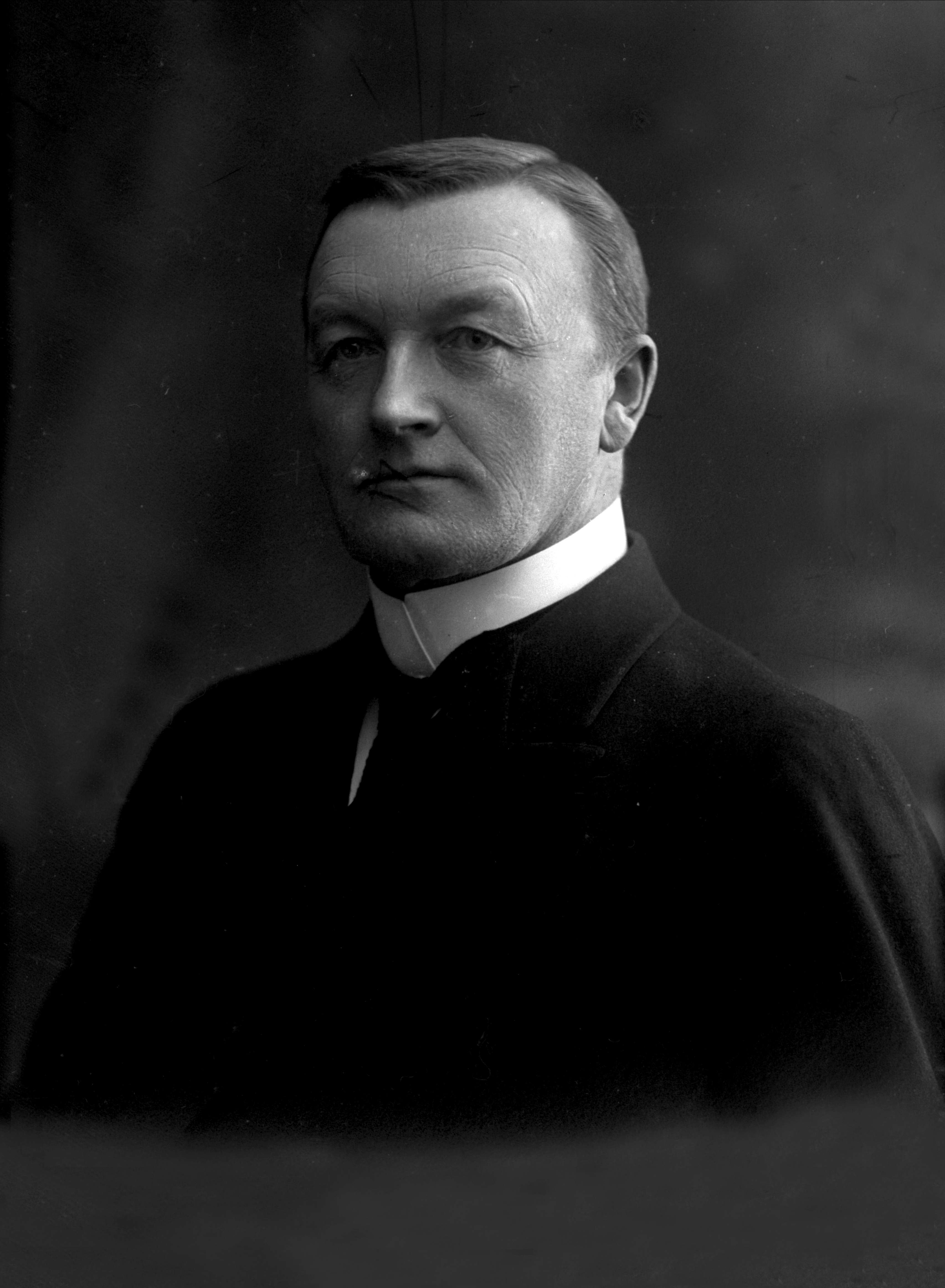 Portrett, Jens Kristian Meinich Bratlie som statsminister, mars 1912.